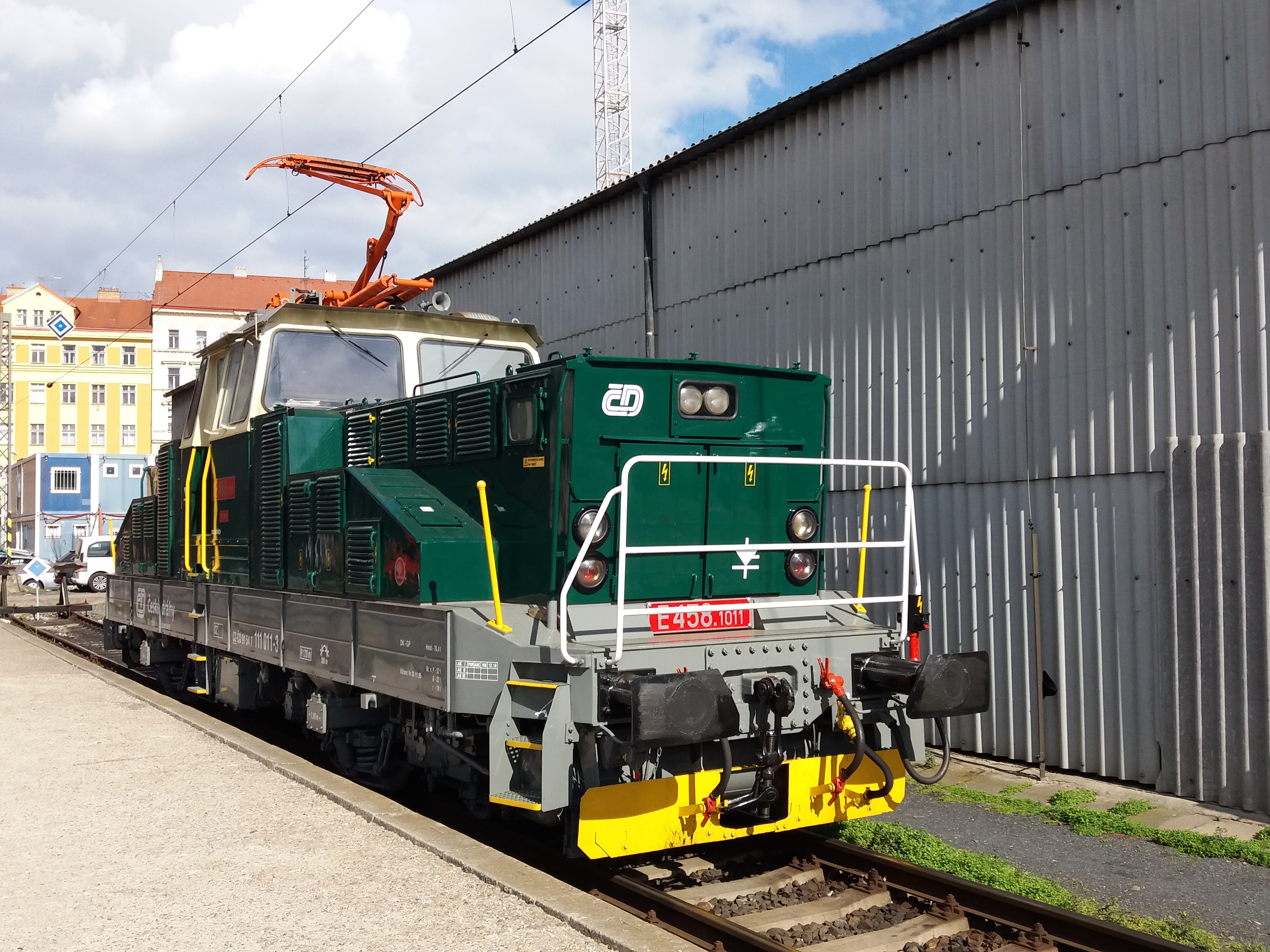 Elektrická posunovací lokomotiva E458.1011 na pražském Hlavním nádraží.